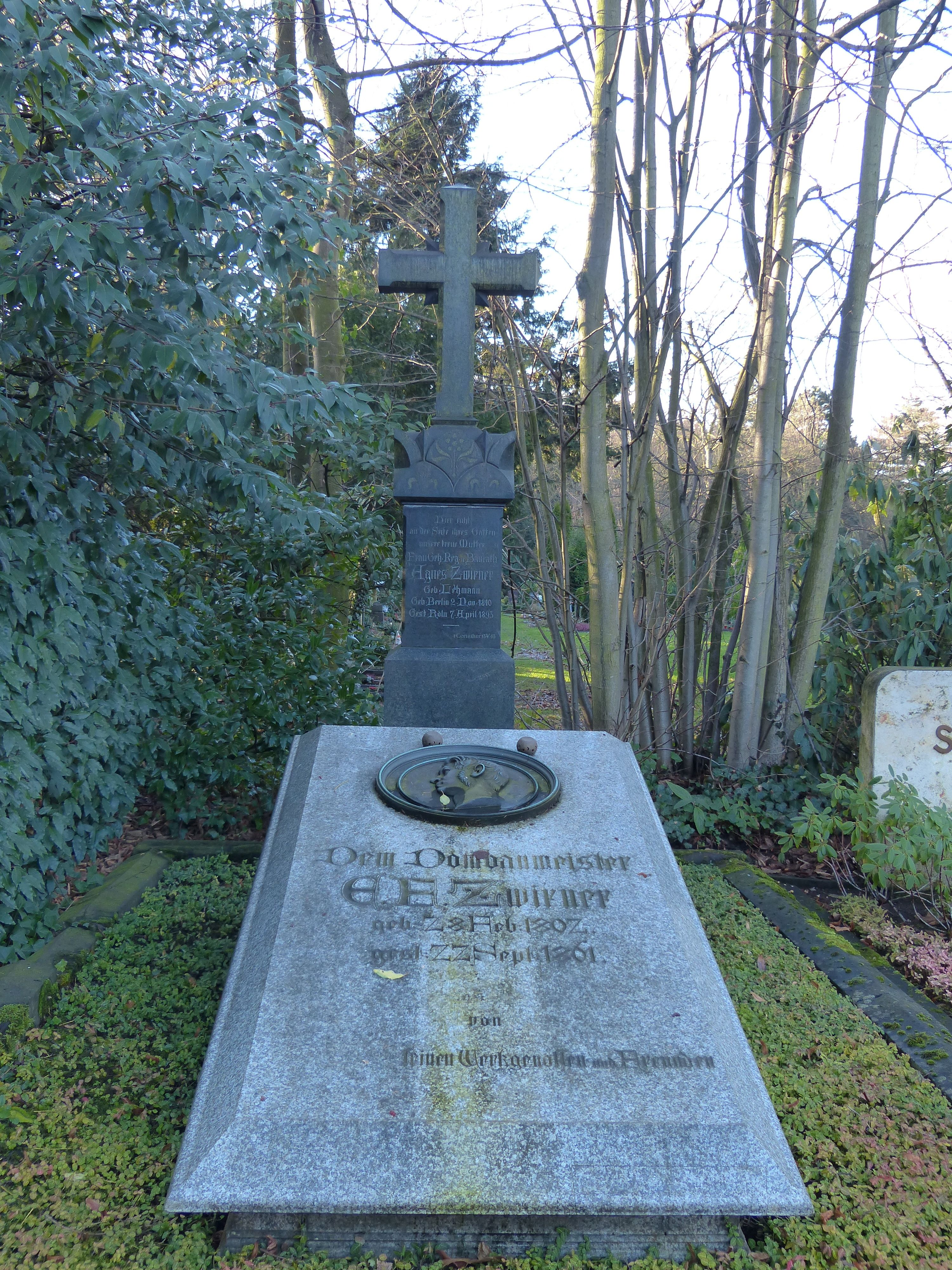 Grabstelle von Ernst Friedrich Zwirner (1802 -1861), Friedhof Melaten, HWG, zwischen Lit K und Lit L, Grabplatte von L. Siegert und Porträtmedaillon von Christian Mohr; Grabkreuz von Agnes Zwirner von Wilhelm Fassbinder